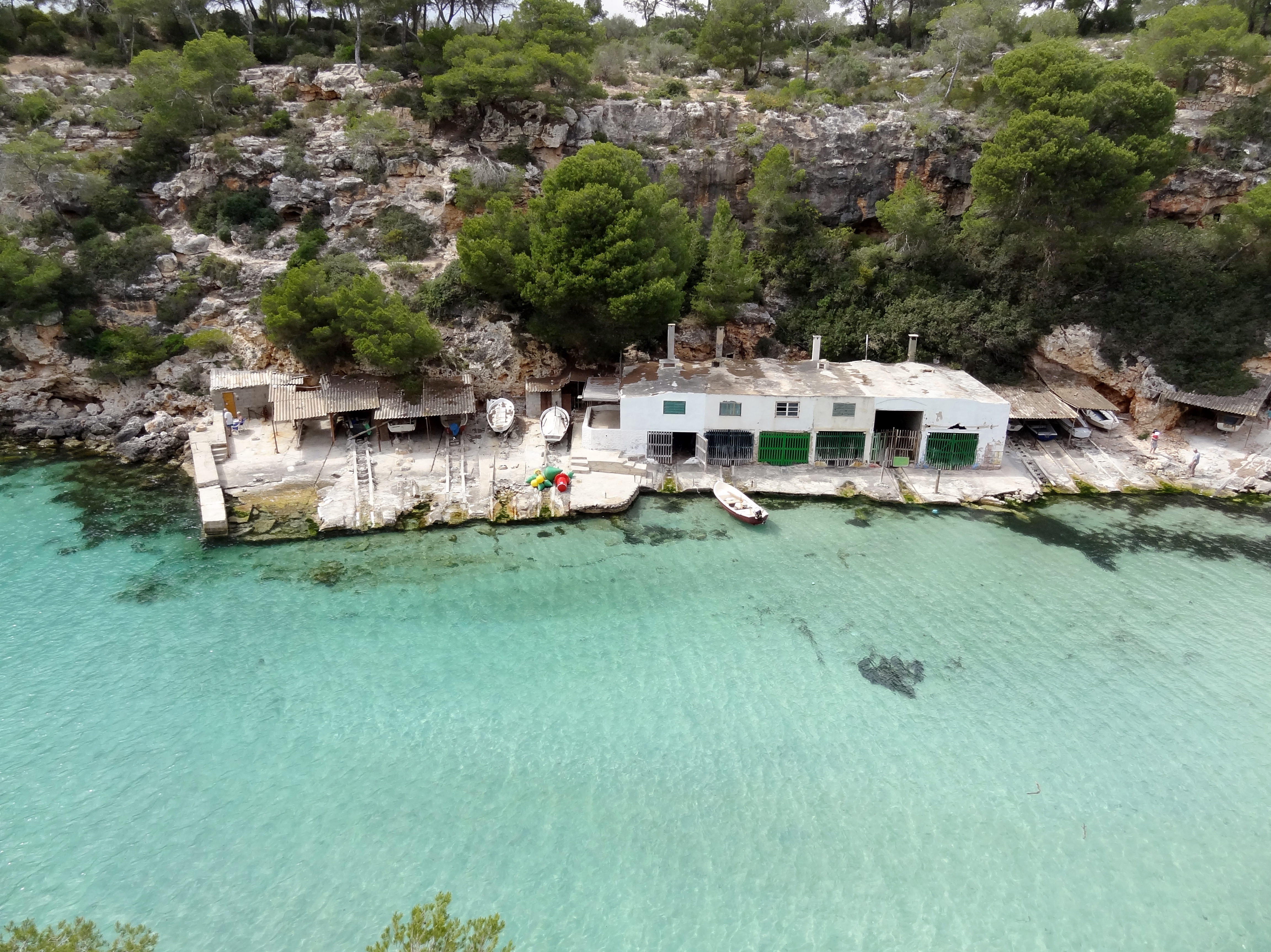 Bootshäuser (escars) an der Cala Pi, Gemeinde Llucmajor, Mallorca, Spanien